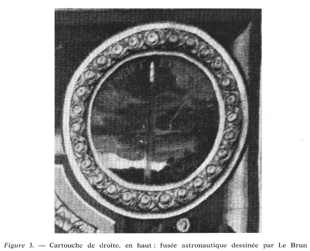 Fusée spatiale imaginée sur une tapisserie des Gobelins, commandée par Colbert et dessinée par Le Brun, 1664.